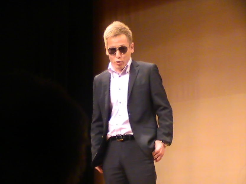 じゅんいちダビッドソン (2014年3月)